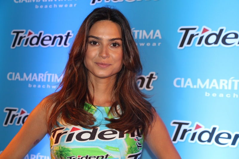 49 - Thayla Ayala-008